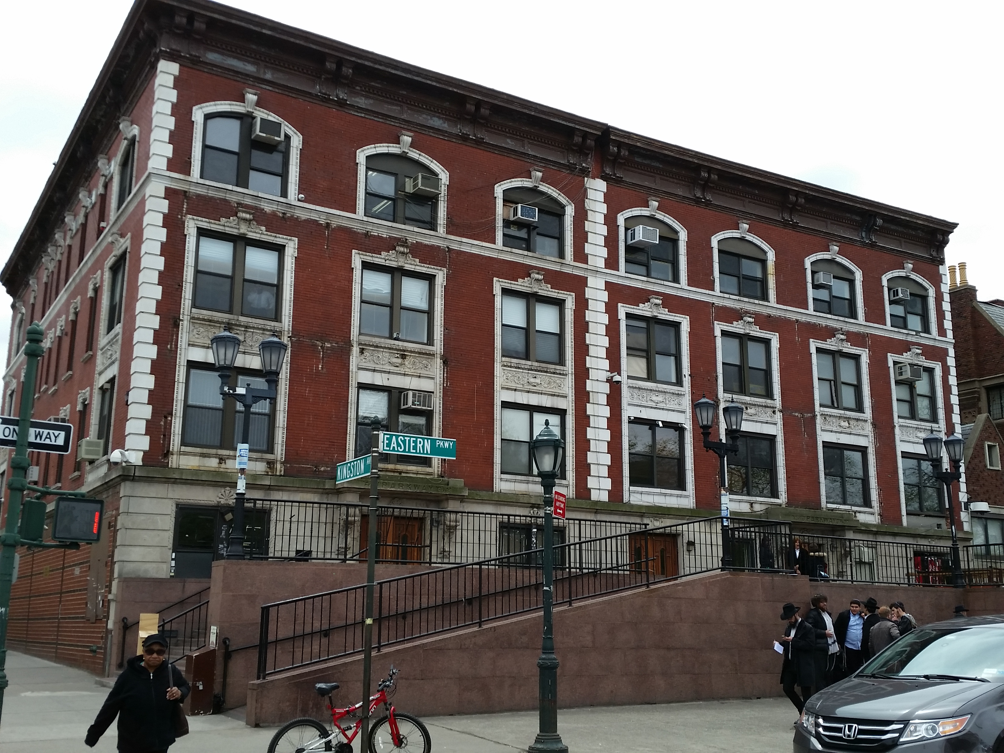 בניין המשרדים 788-784